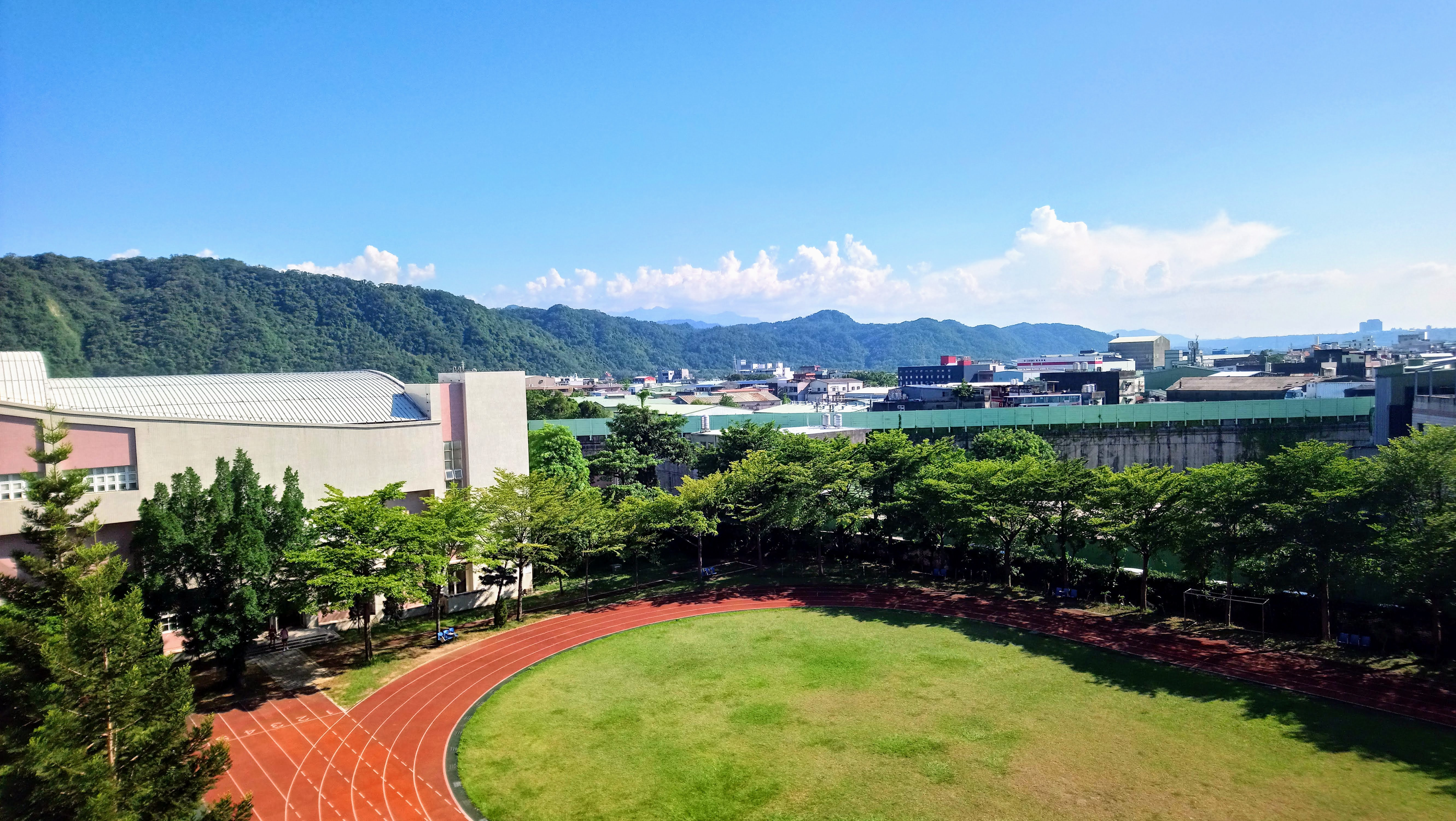 中文（台灣）: 新北市立鶯歌高級工商職業學校操場，後方為學生活動中心